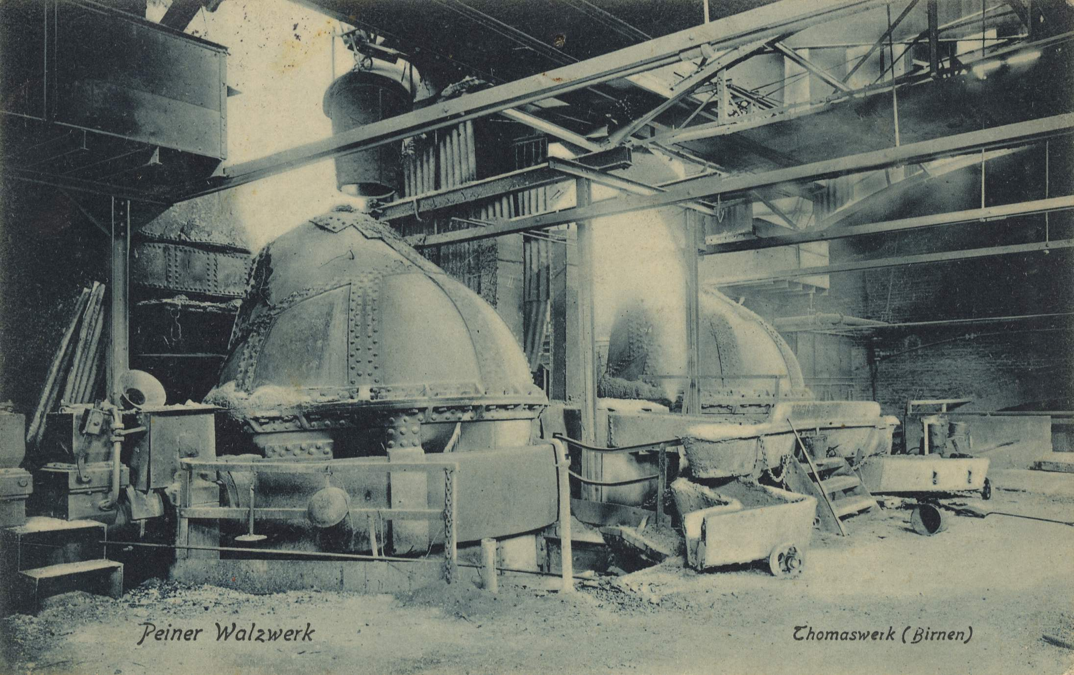 Walzwerk; Thomaswerk (Birnen)